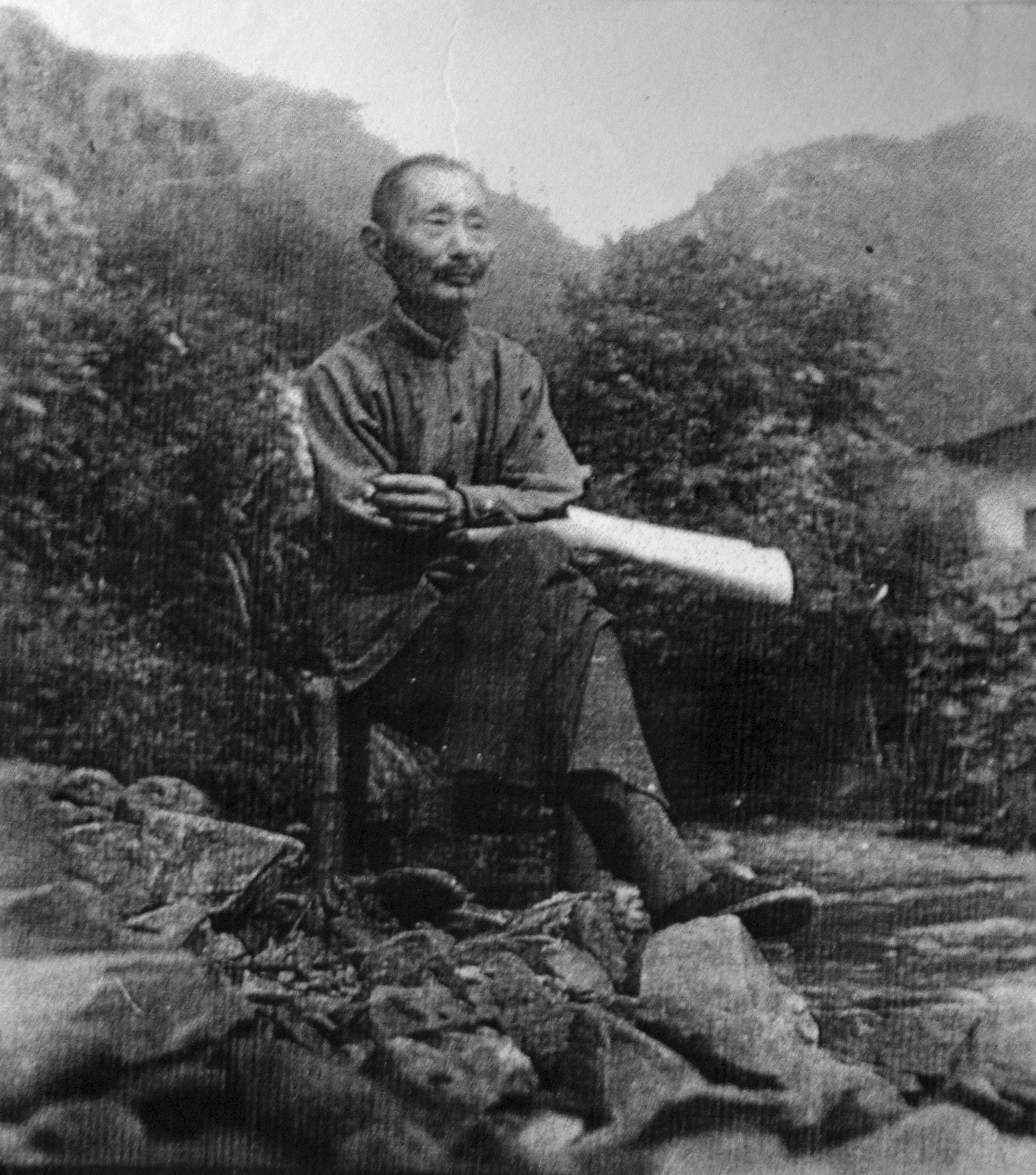 中文（台灣）: 唐啟敏（1903-1987），國軍少校。